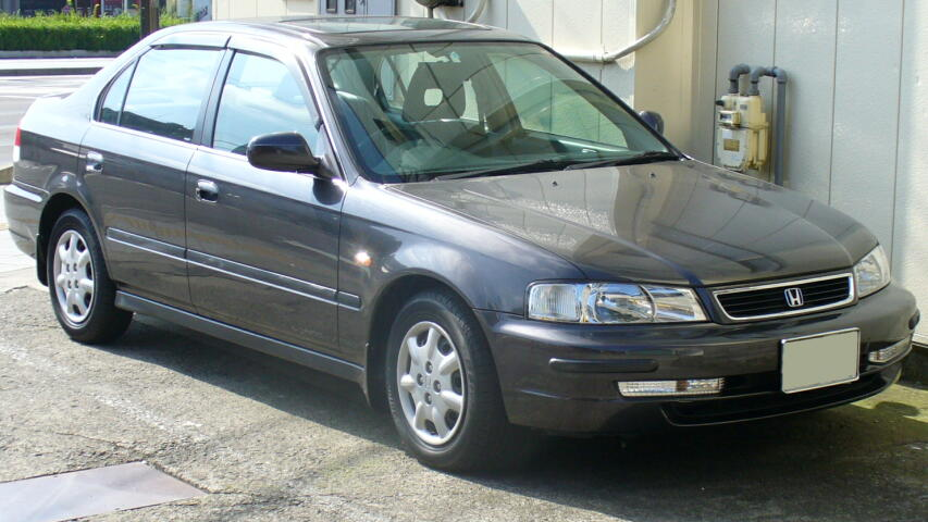 2代目ホンダ・ドマーニ